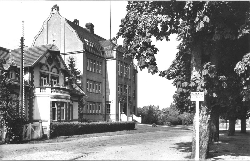 Ówczesna szkoła średnia dla dziewcząt w ówczesnym Greifenberg/Pommern (Niemcy) - dziś Gryfice (Polska)